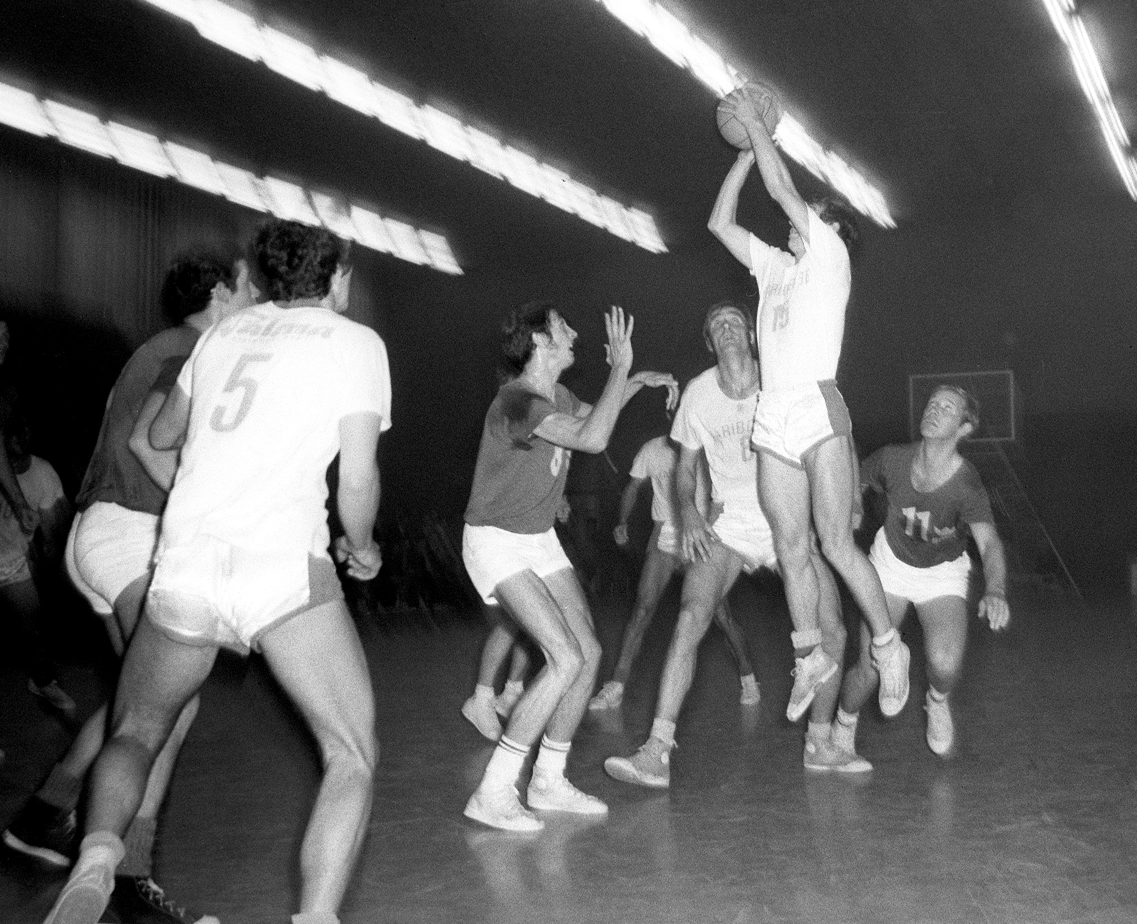 Kvalifikacijska tekma za uvrstitev v prvo ligo Slovan - Maribor 66.